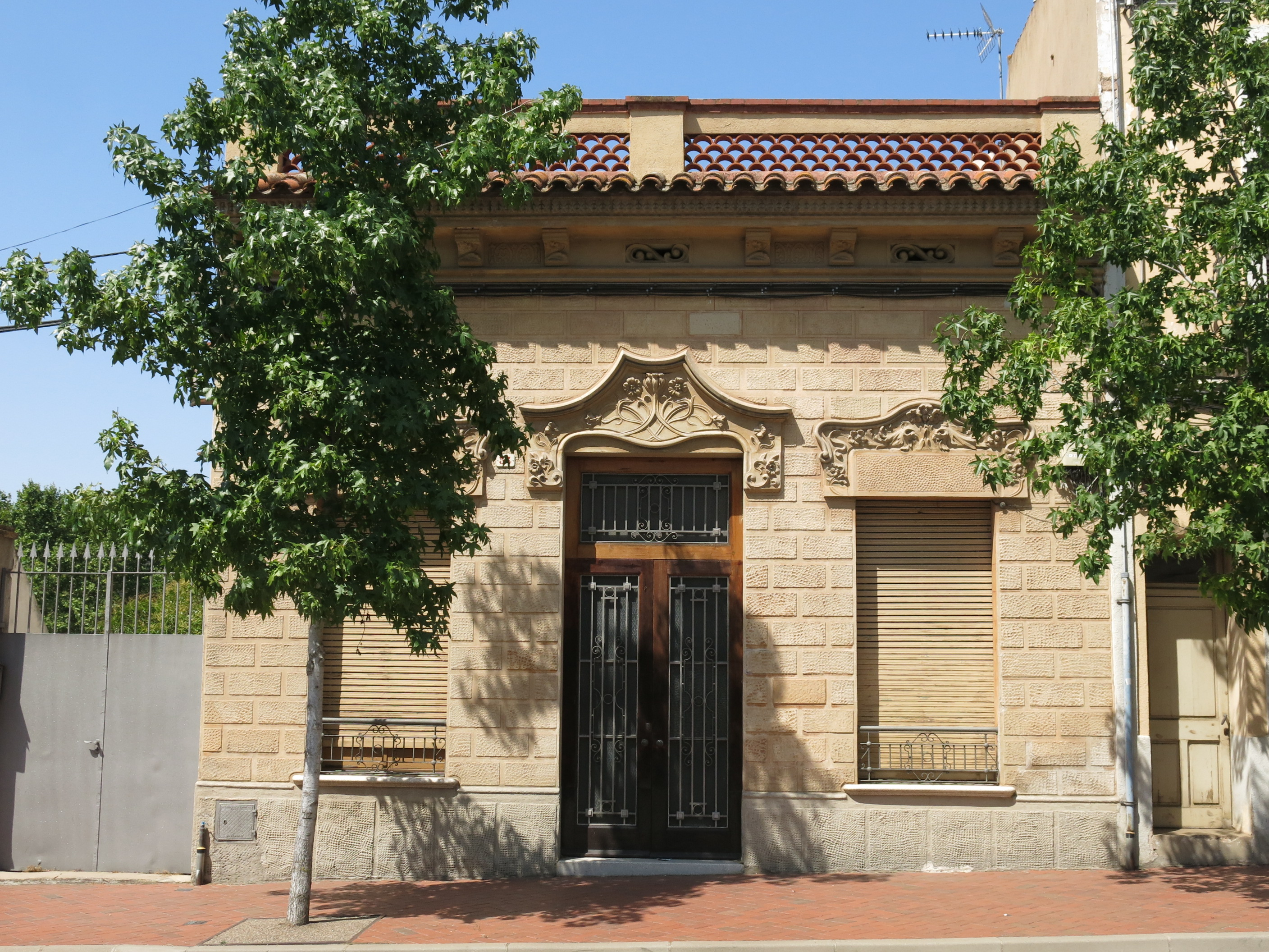 Habitatge al passeig Anselm Clavé, 54 (Sentmenat)